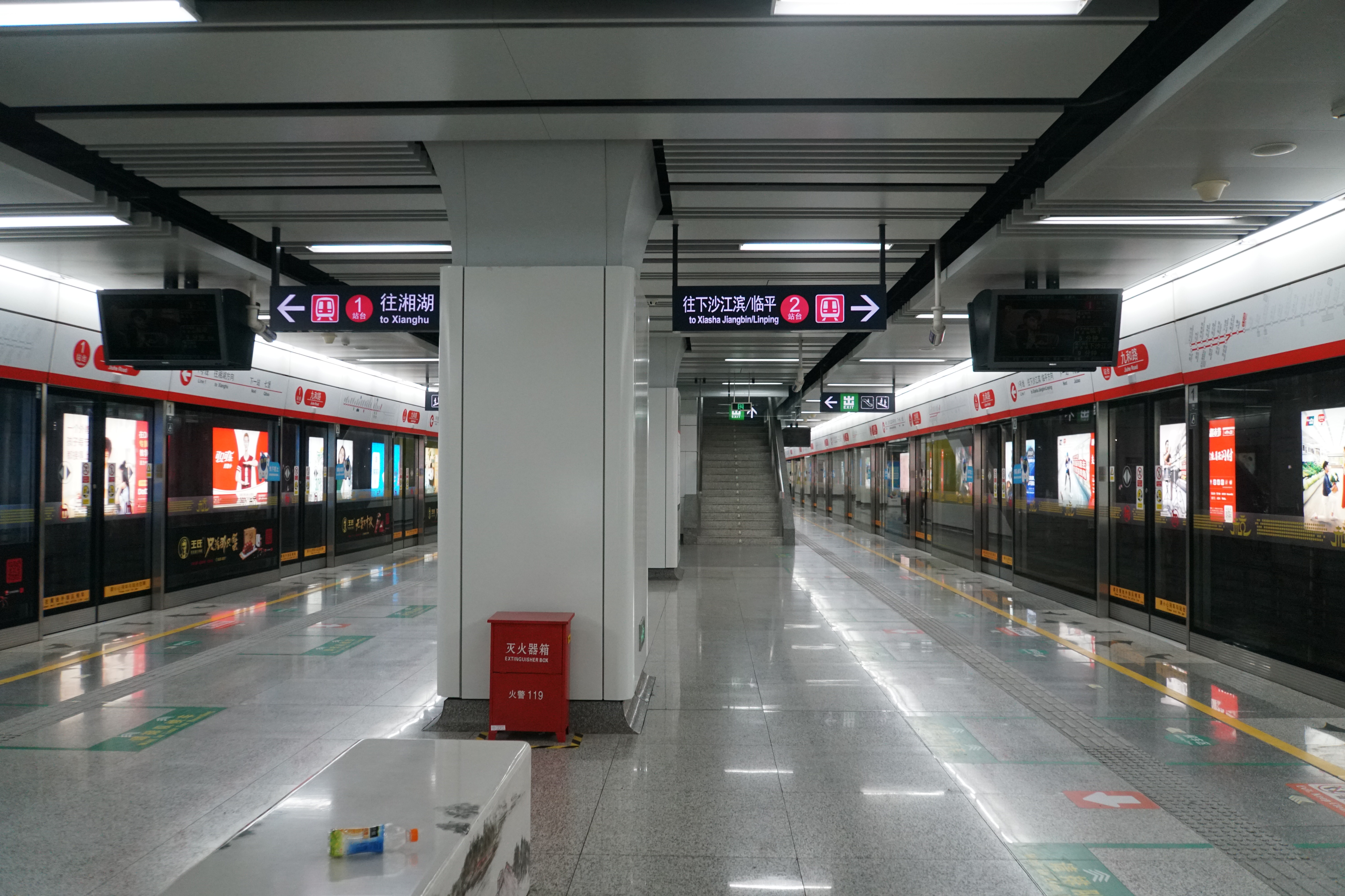 九和路站站台，2018年